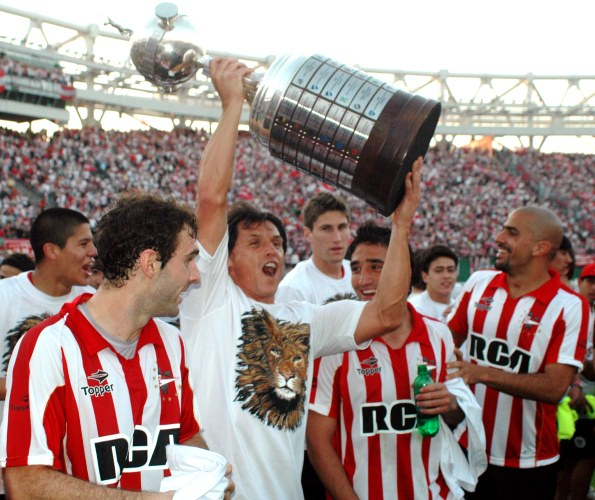 El plantel de Estudiantes de La Plata, en la vuelta olímpica por la obtención de la Copa Libertadores de América, luego de la victoria ante Gimnasia, por 3-0, en el clásico platense del 29 de agosto de 2009.